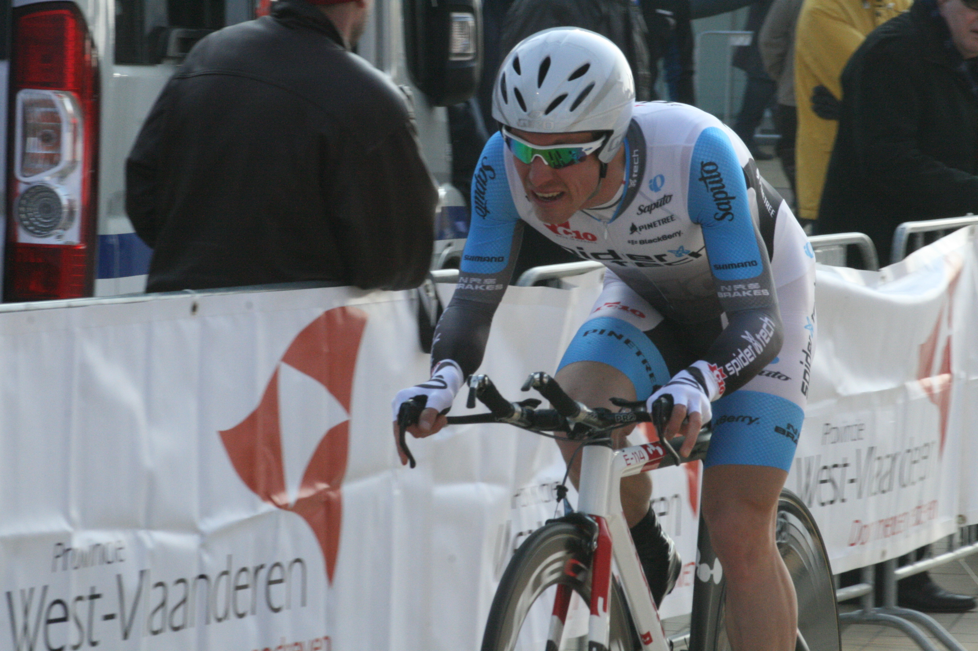 Driedaagse van West-Vlaanderen 2011, proloog in Middelkerke